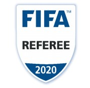 Escarapela FIFA similar a la que portan los árbitros asistentes internacionales categoría FIFA